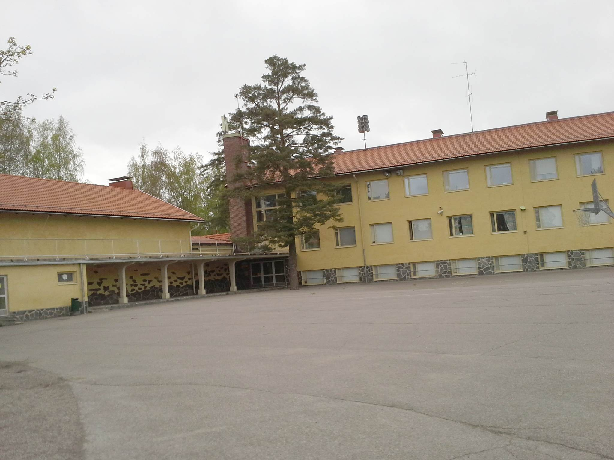 Laajalahden koulu toukokuussa 2014